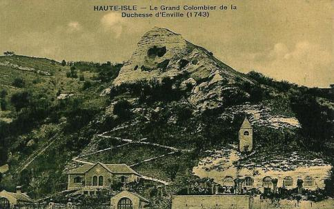 Numérisation d'une carte postale centenaire représentant le Grand colombier de la Duchesse d'Enville à Haute-Isle, France.